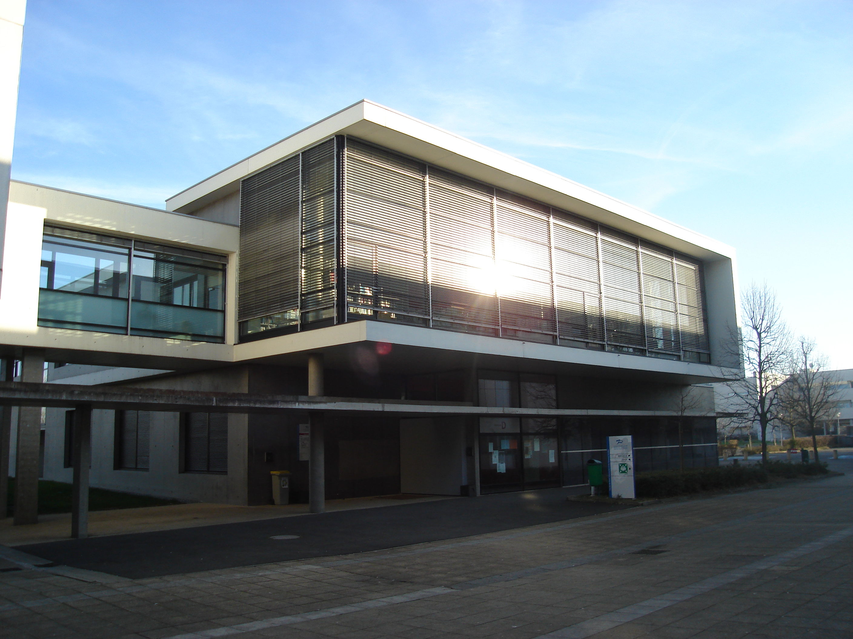 Bâtiment D de la Faculté de droit, d'économie et des sciences sociales de Tours, sur le campus des Deux-Lions